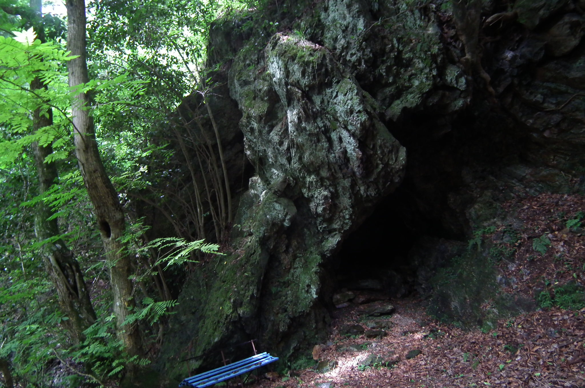 Mt. Mitake 御嶽（篠山市） 登山道 愛染窟